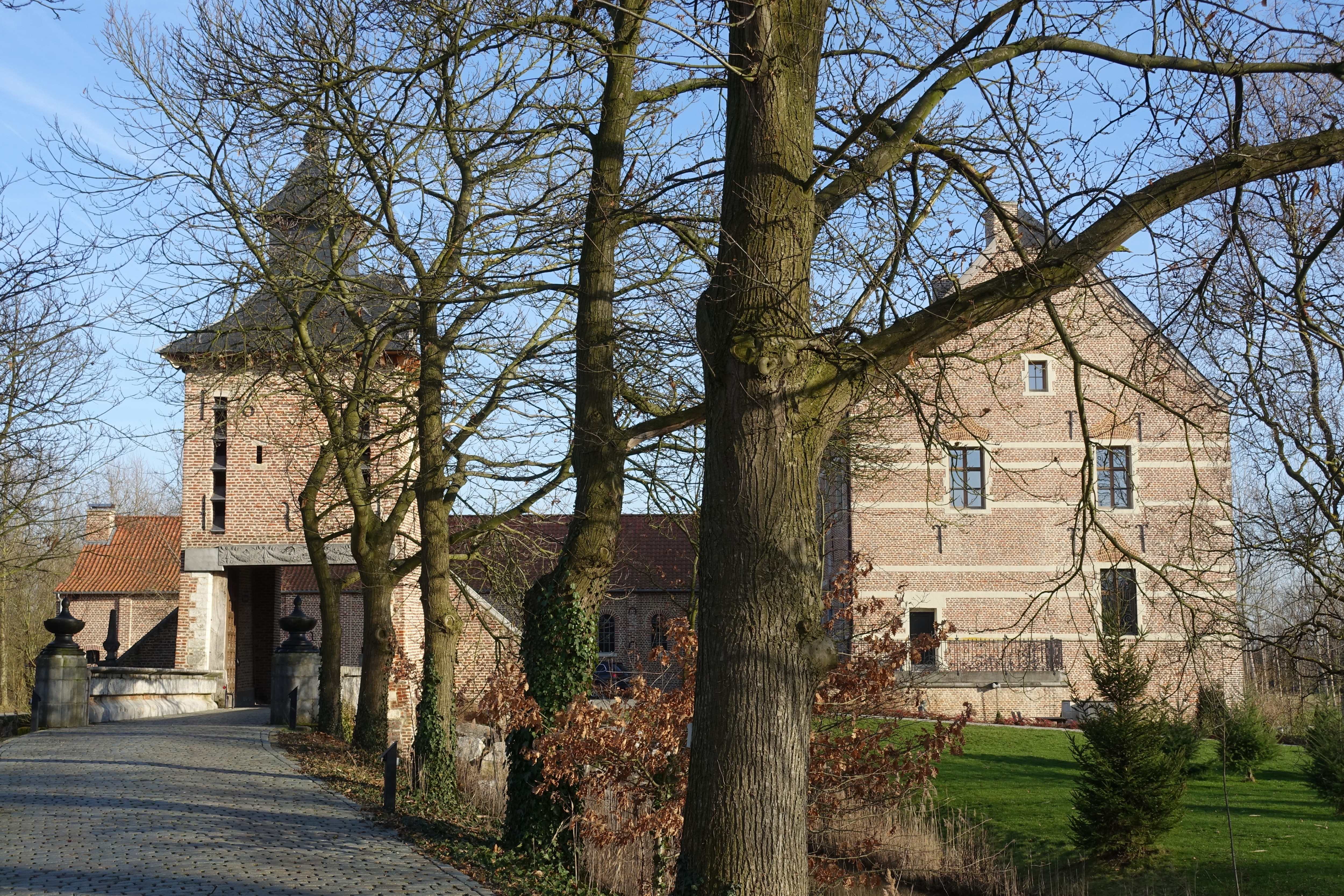 Kasteel van Binderveld (Nieuwerkerken) omringd door grachten. Reeds vermeld in de 12de eeuw. Huidige gebouwen uit 1729. Vroeger gesloten complex waarvan het woonhuis en de torenbrug bewaard bleven